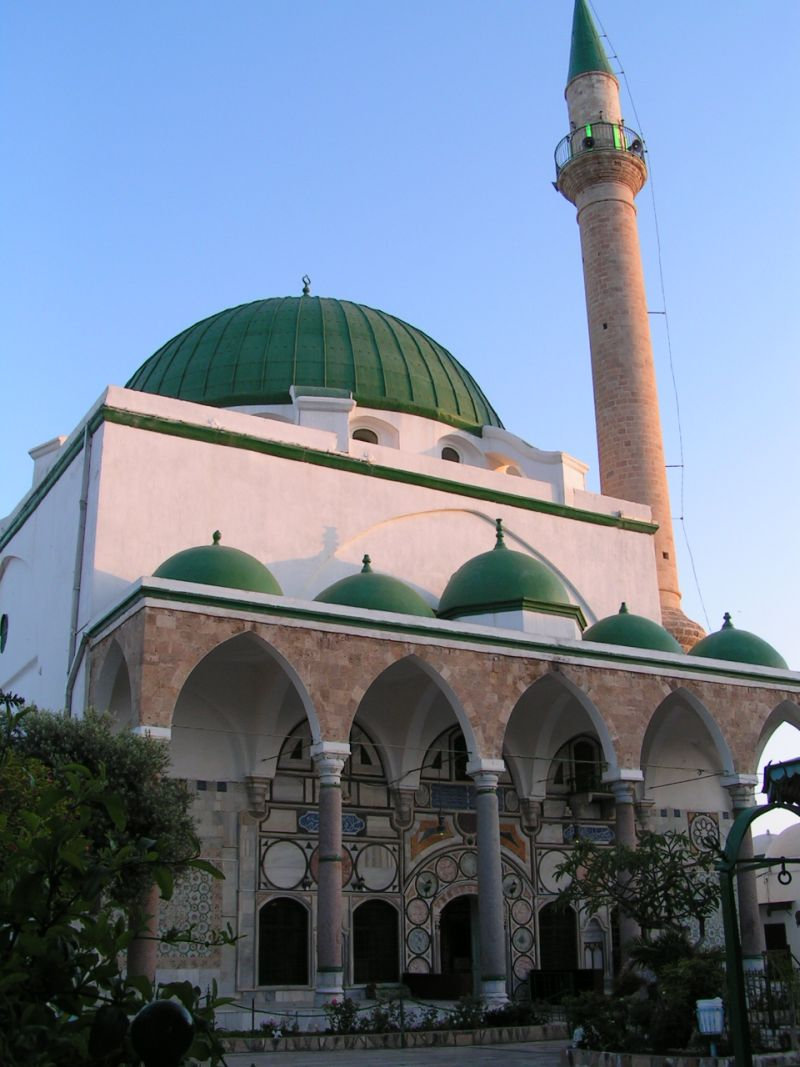 Mosque Al Djazar